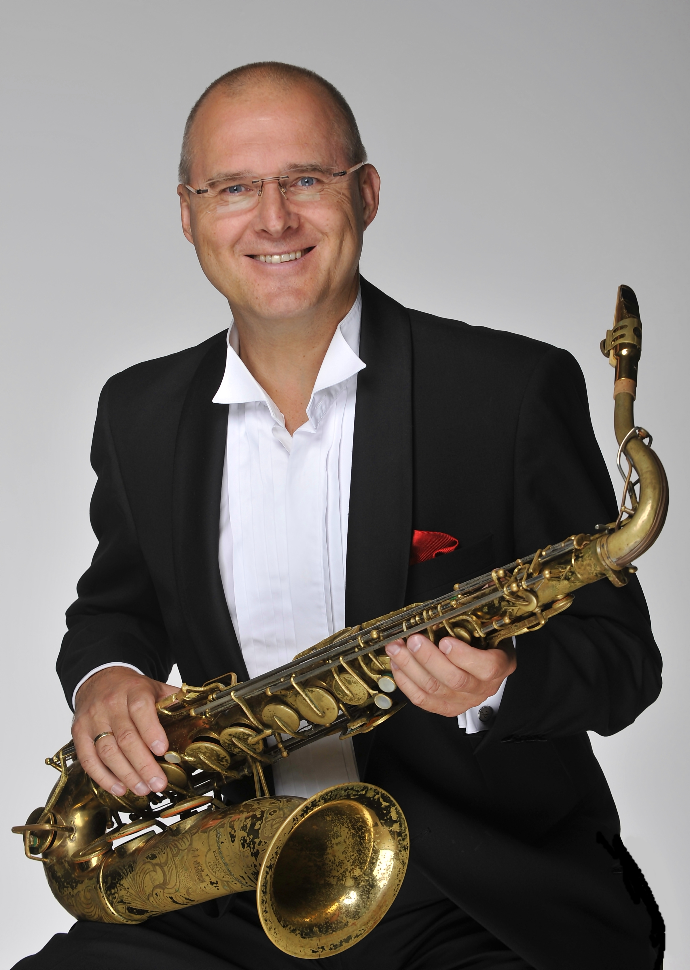 Der Jazzmusiker Engelbert Wrobel mit seinem Altsaxophon